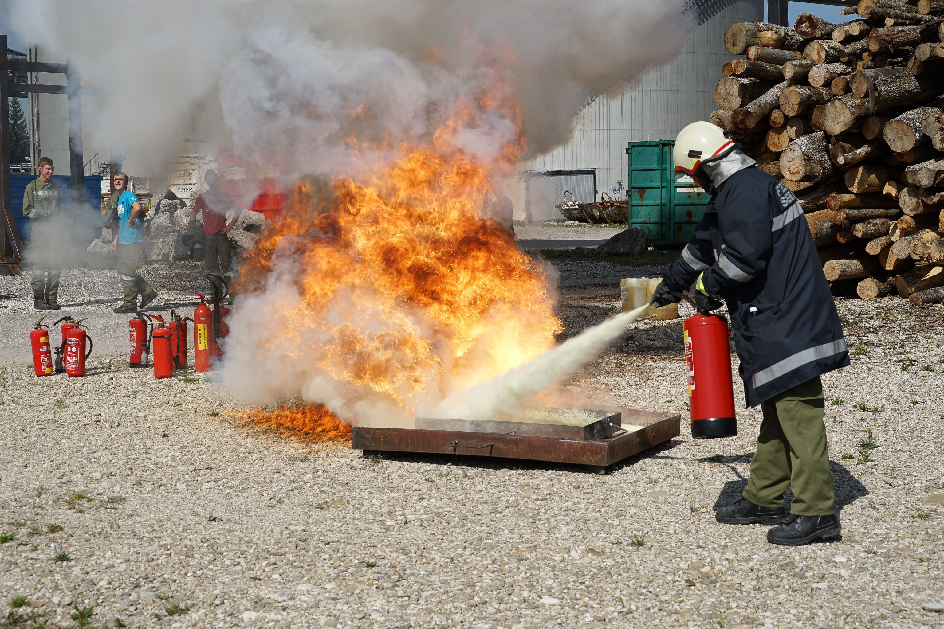 Vorführung vom Löschen mittels Feuerlöschers - Grundlehrgang für den Bezirk Vöcklabruck bei der Betriebsfeuerwehr Energie AG Timelkam